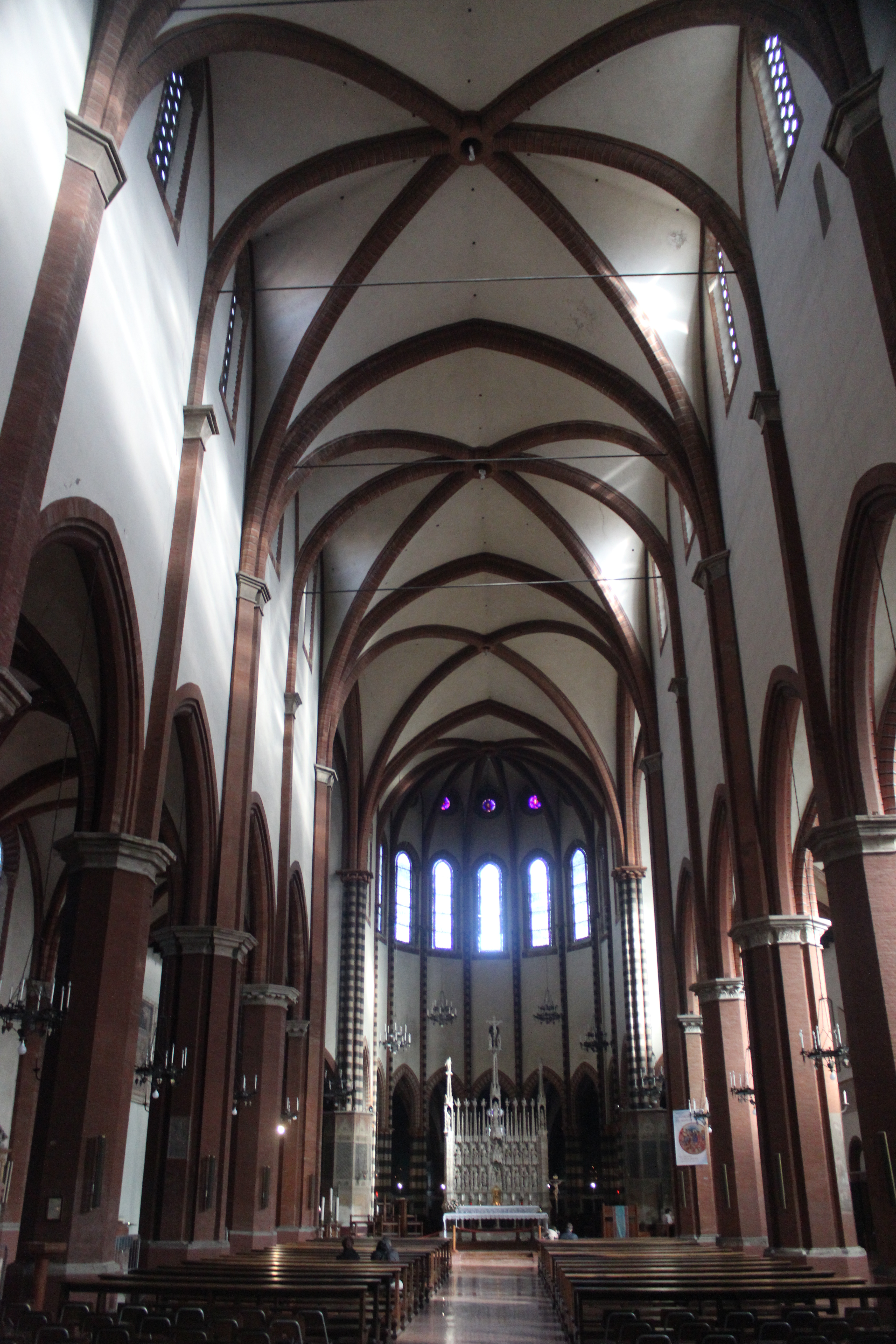 Bolonia, San Francesco, interior.